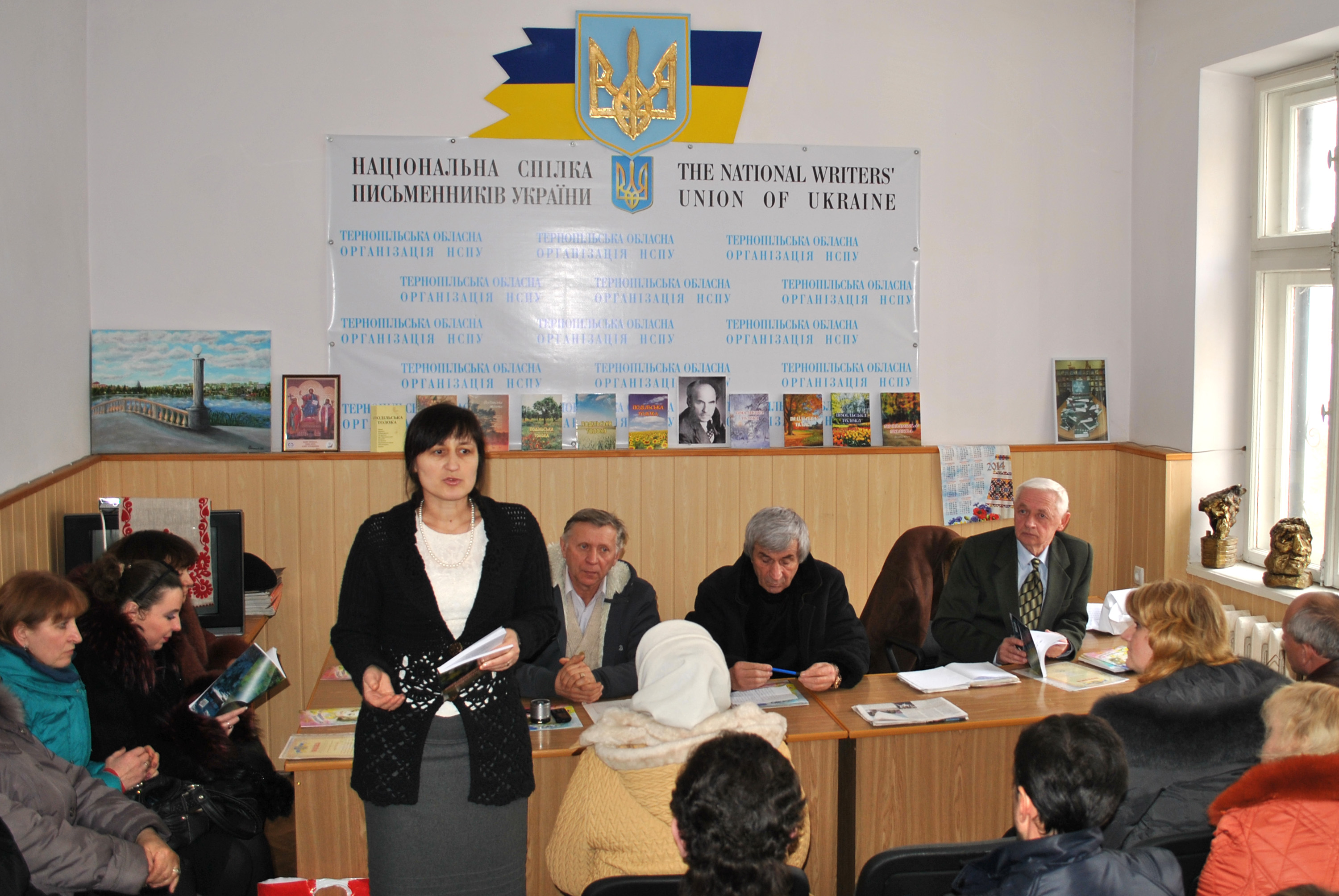 Зібрання літературного об'єднання при Тернопільській обласній організації Національної спілки письменників України.